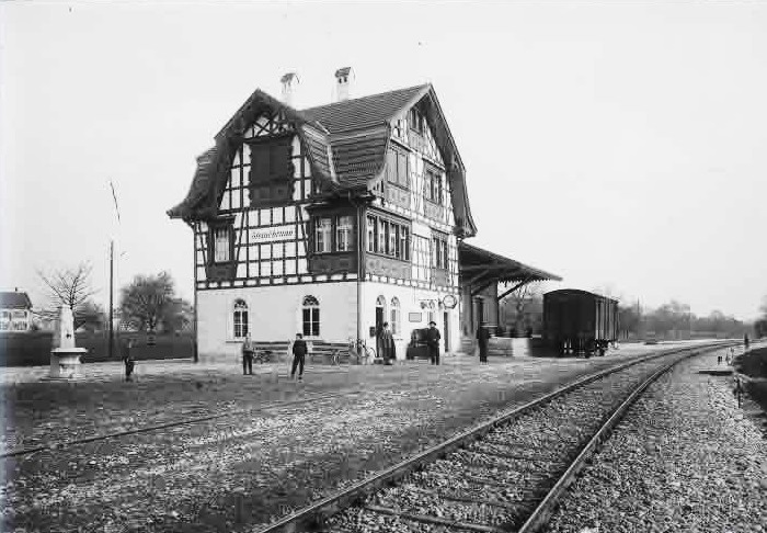 Stationsgebäude Steinebrunn nach der Fertigstellung